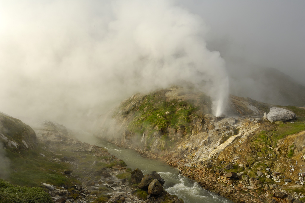 Извержение гейзера Жемчужный, Долина Гейзеров